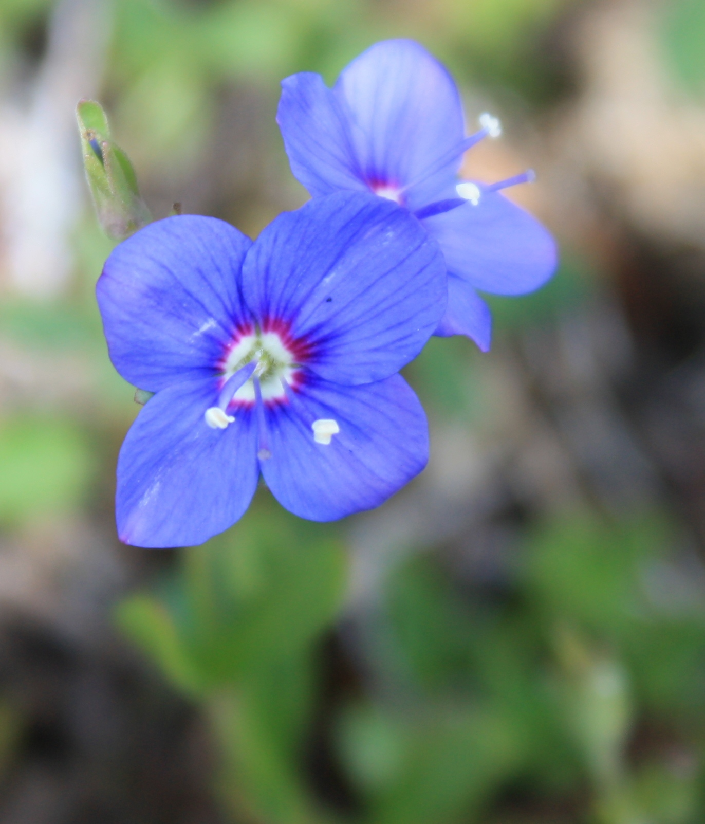 Bergveronika Veronica fruticans Griningsdalen Jotunheimen